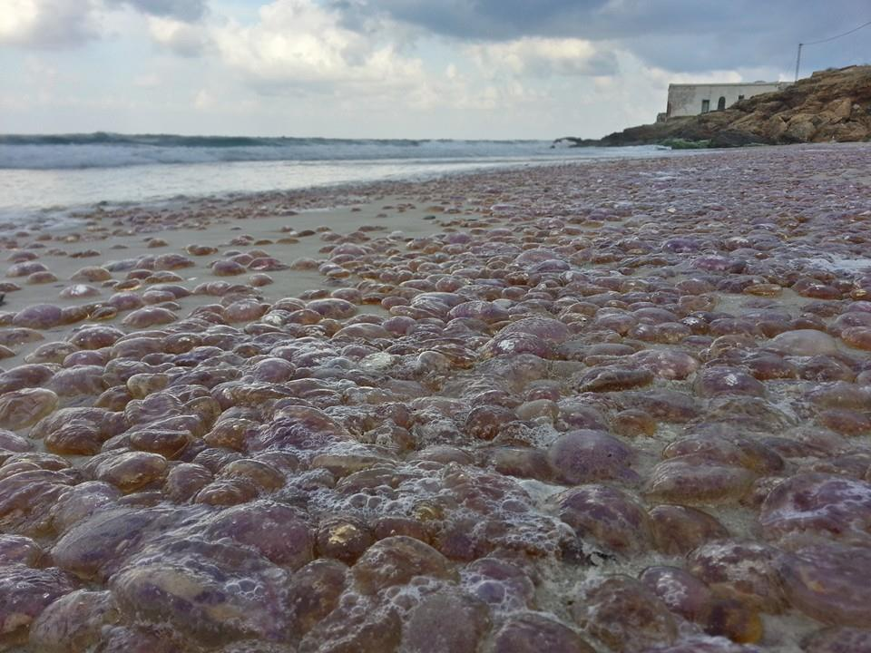 Pelagia noctiluca le 9 Mars 2014 a Ras Djebel Plage Ain Charchara, Bizerte, Tunisie